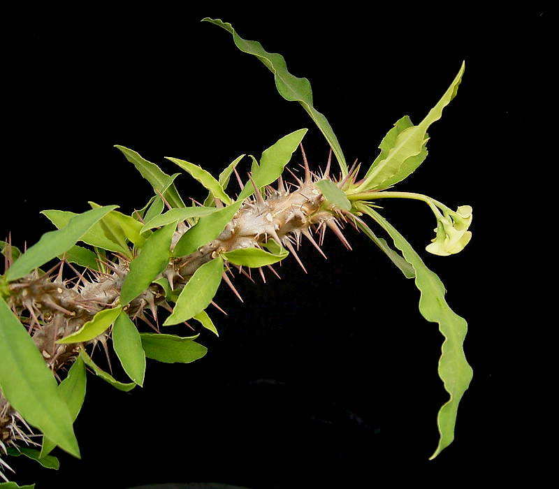 Euphorbia capuronii